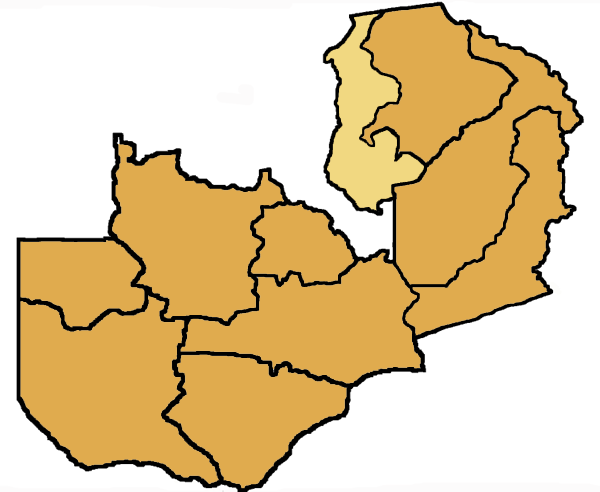 Mappa della diocesi di Mansa, in Zambia. Lavoro personale, eseguito a partire da questa immagine di Commons. Fonte per i confini: Guida delle missioni cattoliche 2005, a cura della Congregatio pro gentium evangelizatione, Roma, Urbaniana University Press, 2005. Categoria:Chiesa cattolica in Zambia Categoria:Mappe dell'Africa